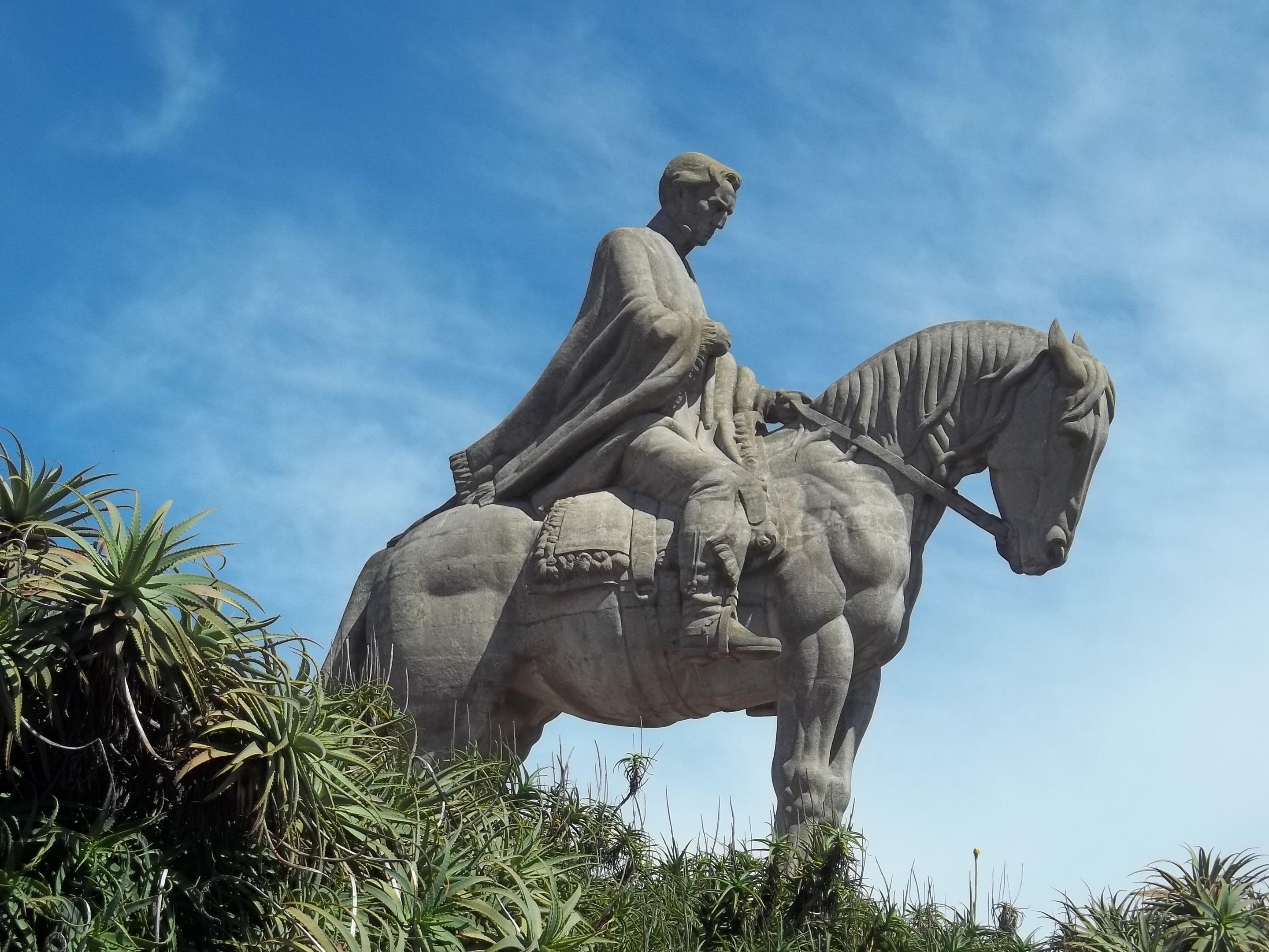 Monumento a José Artigas en Cerro Ventura, Minas - Uruguay, visto de perfil.